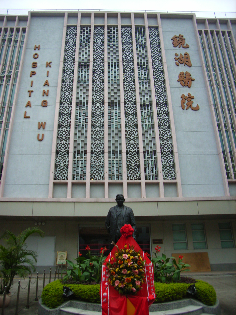 澳門的觀光點 鏡湖醫院 Macau sightseeing - Kiang Wu Hospital